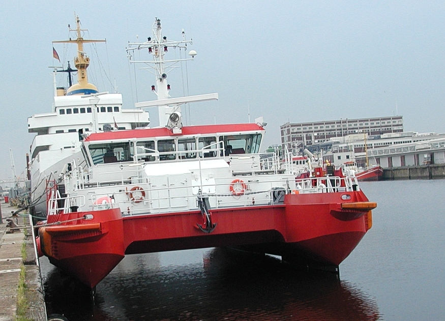 SWATH LotsentenderDöse in Cuxhaven